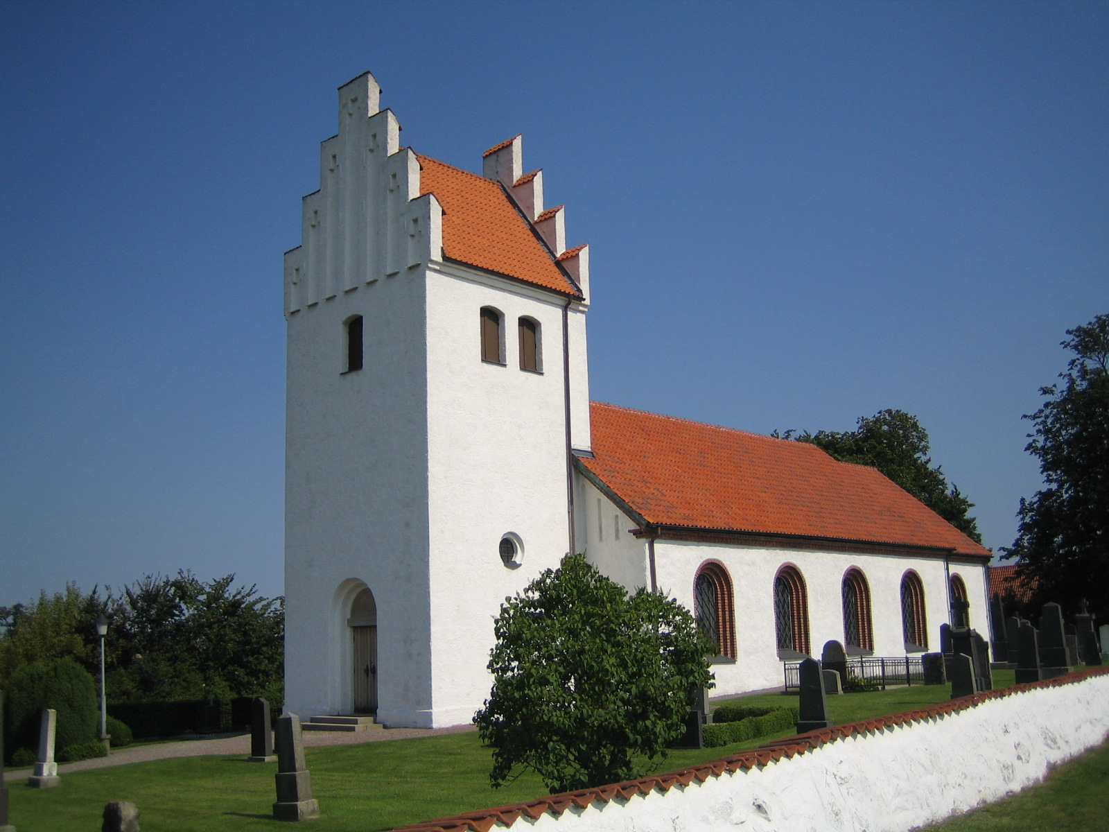 Esarps kyrka. Bilden tagen av mig själv den 20 augusti 2005.